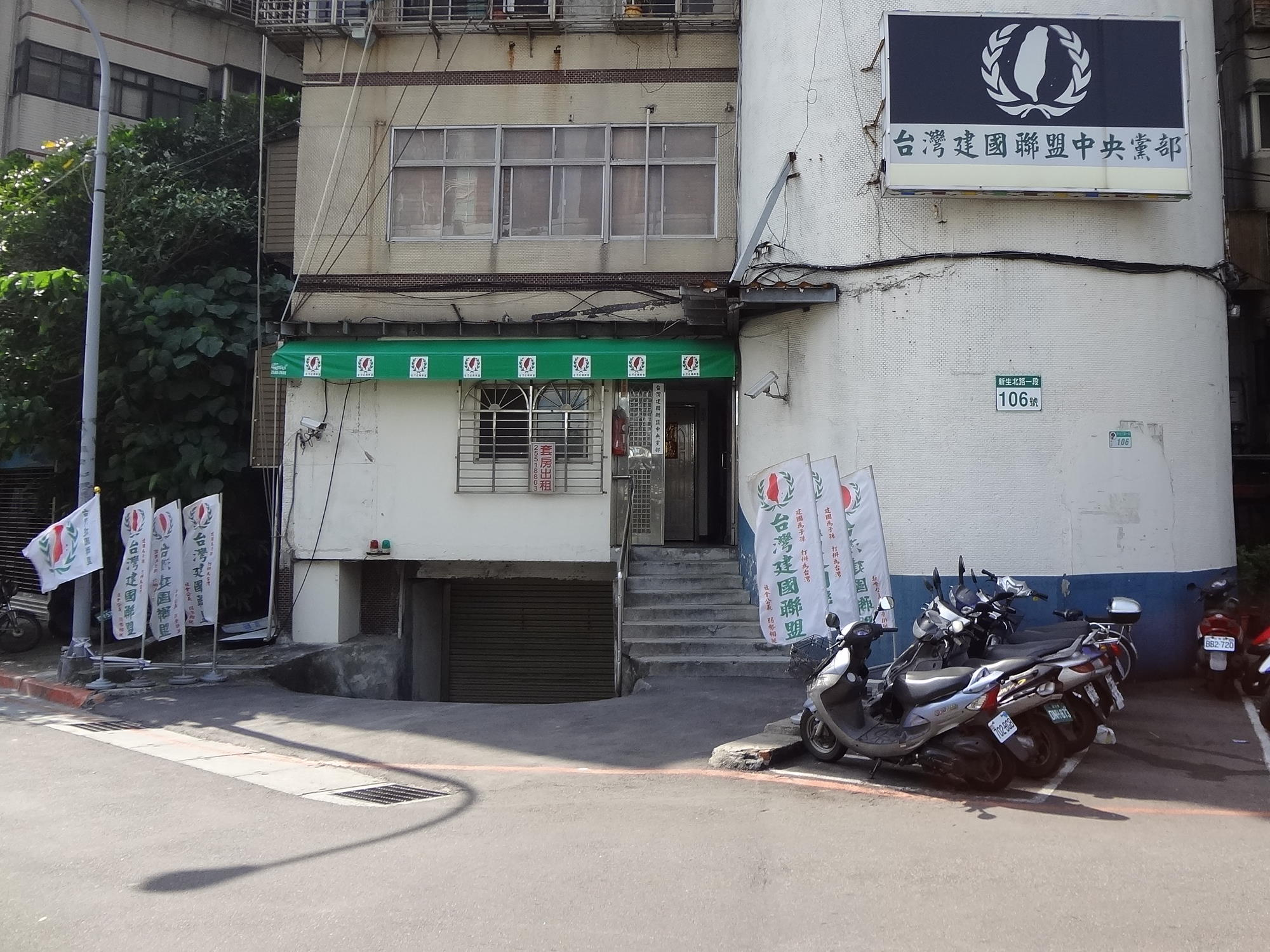 台灣建國聯盟中央黨部，位於臺北市中山區新生北路一段106號1樓。